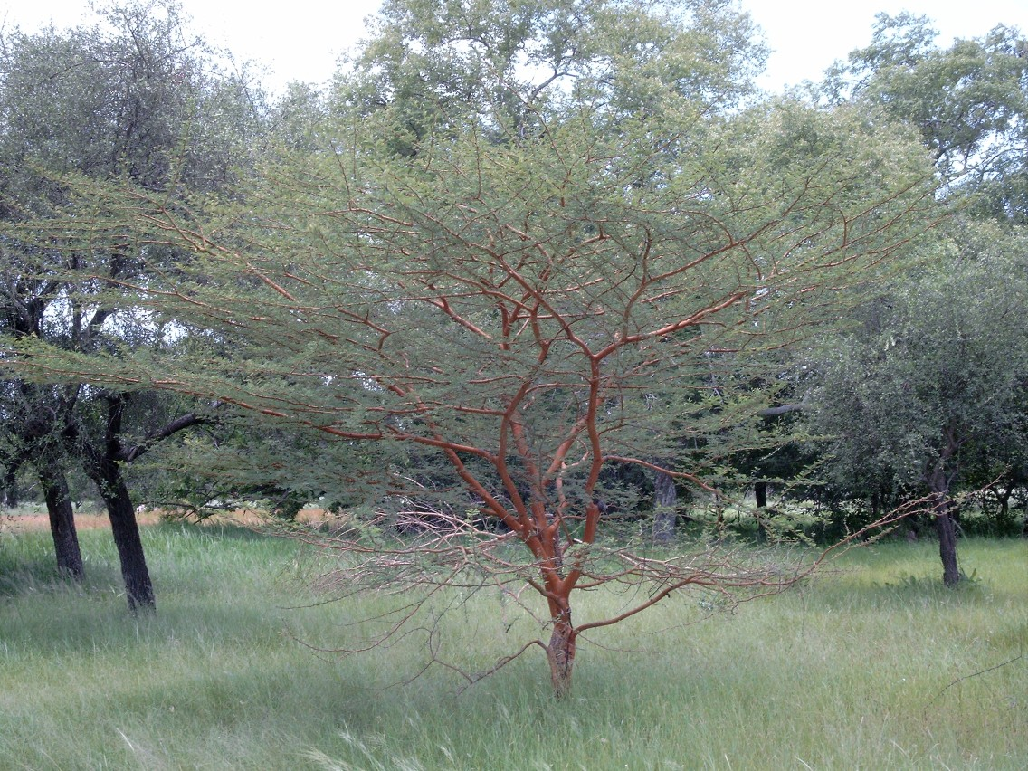 Acacia seyal. Humid savanna near Kikidéni, Burkina Faso.